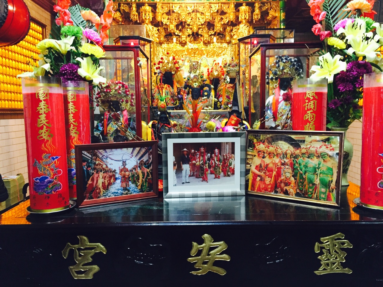 中文（台灣）: 板橋靈安宮神龕一景